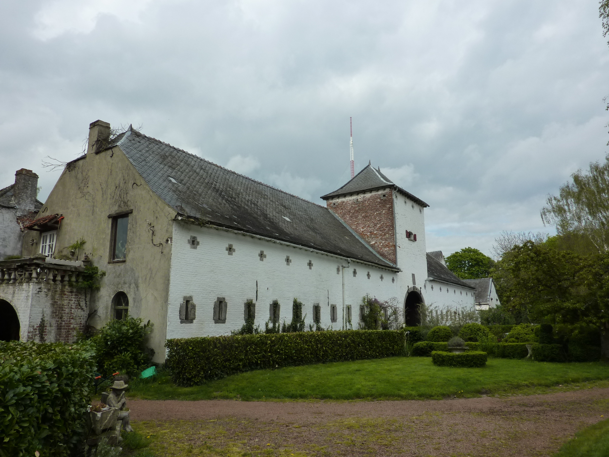 Commanderie de la Neuve-Court (Wavre)